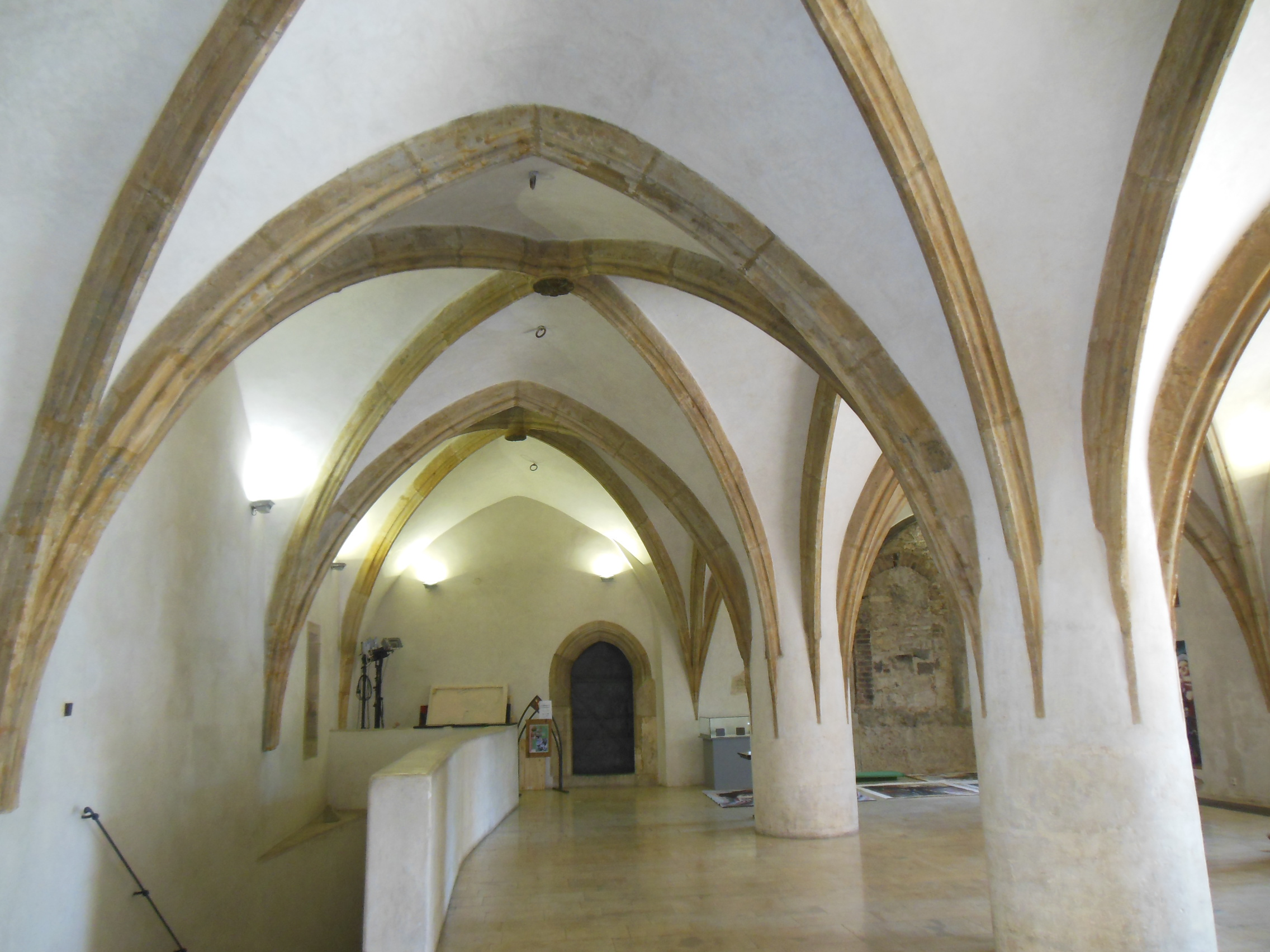 Praha-Nové Město. Karlovo náměstí, Novoměstská radnice, mázhaus.